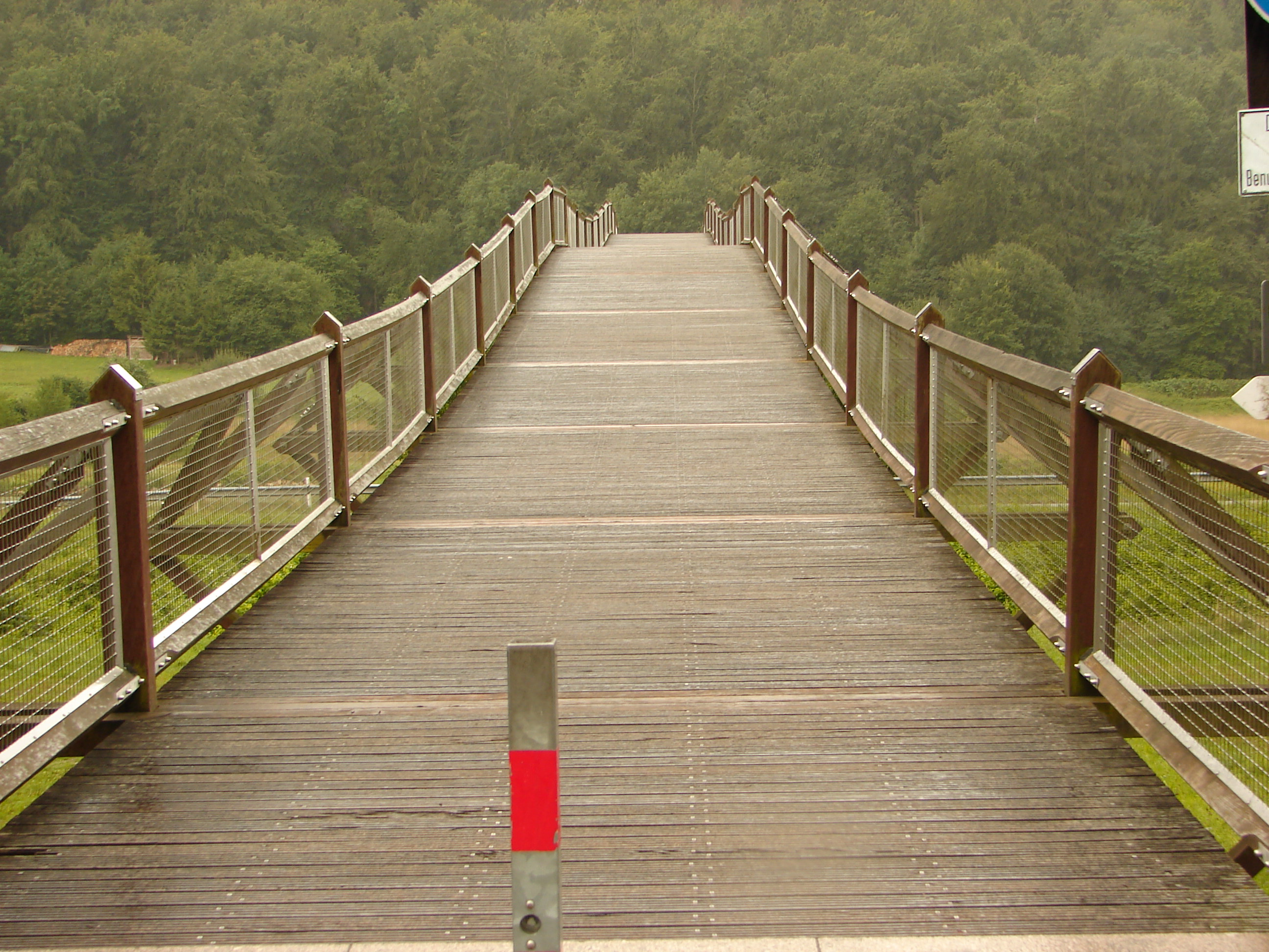 Holzbrücke an der Rhein-Main-Donau-Kanal/ Ansicht von der Weihermühle in Essing